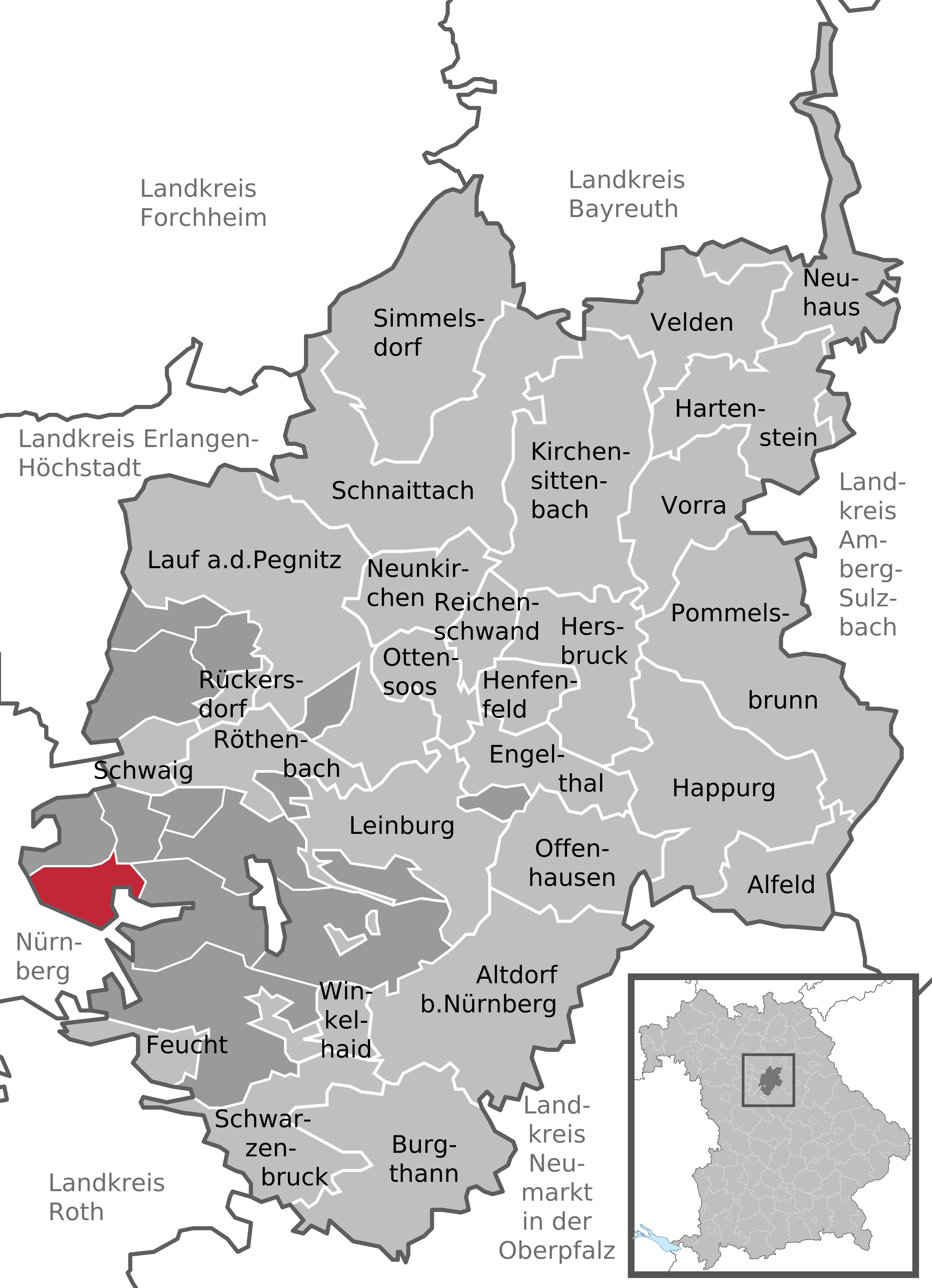 Positionskarte des gemeindefreien Gebietes Forsthof